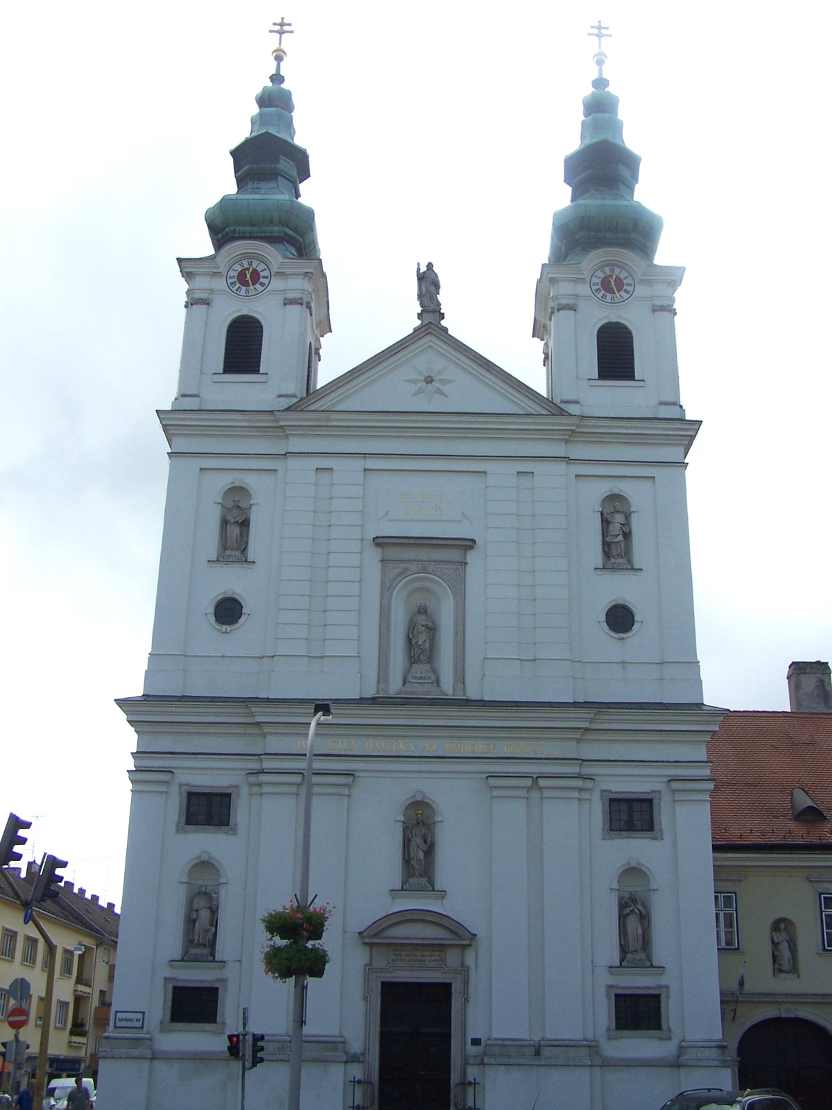 Szent Júdás Tádé római katolikus templom, Domonkos templom (Sopron, Széchenyi István tér 3-4. Mátyás király utca 2.) This is a photo of a monument in Hungary. Identifier: 4940